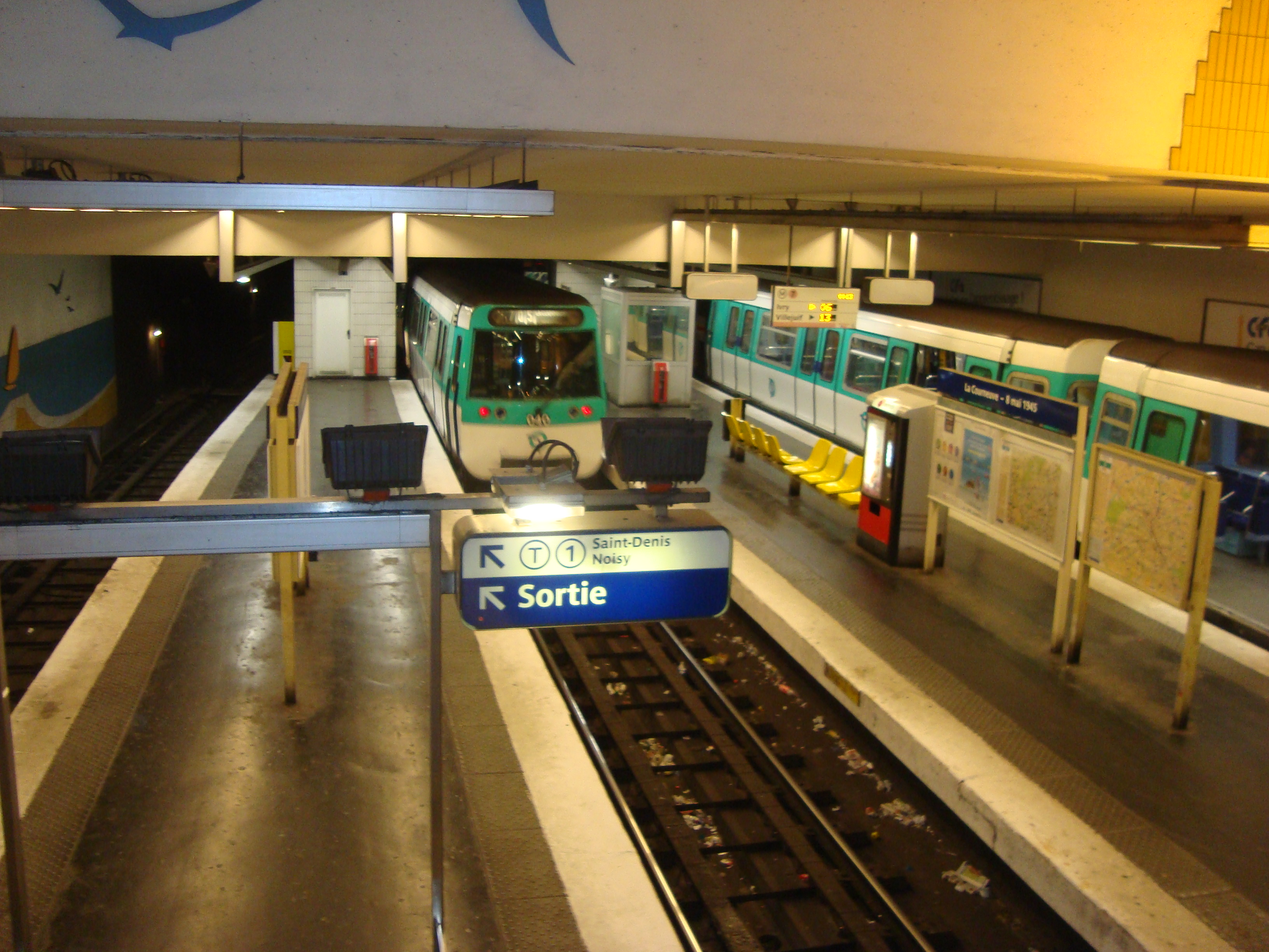 Sur la voie centrale, une rame s'éloigne vers Fort d'Aubervilliers.